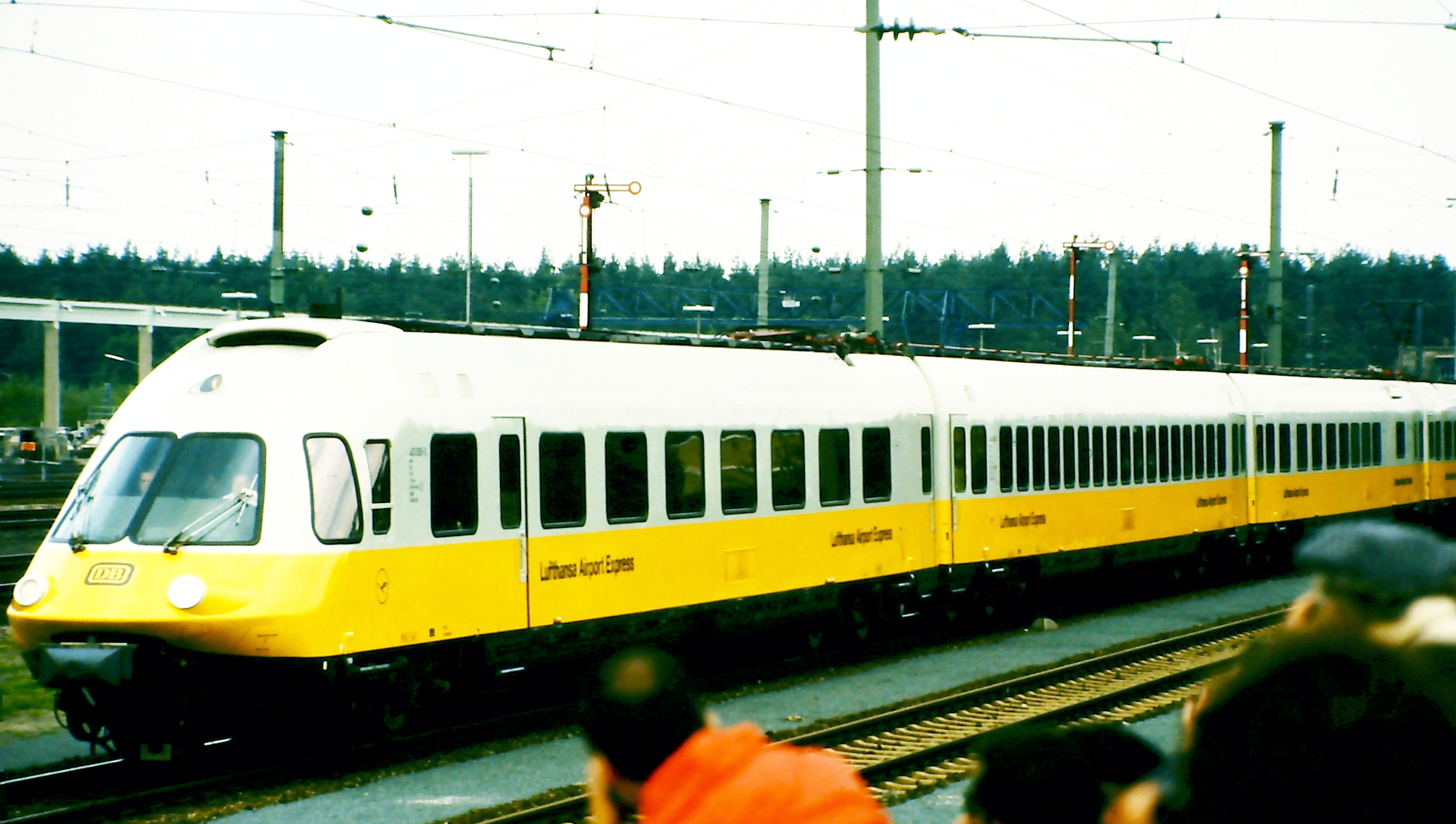 Lufthansa Airoprt Express bei der Jubiläumsparade 150 Jahre deutsche Eisenbahn in Nürnberg